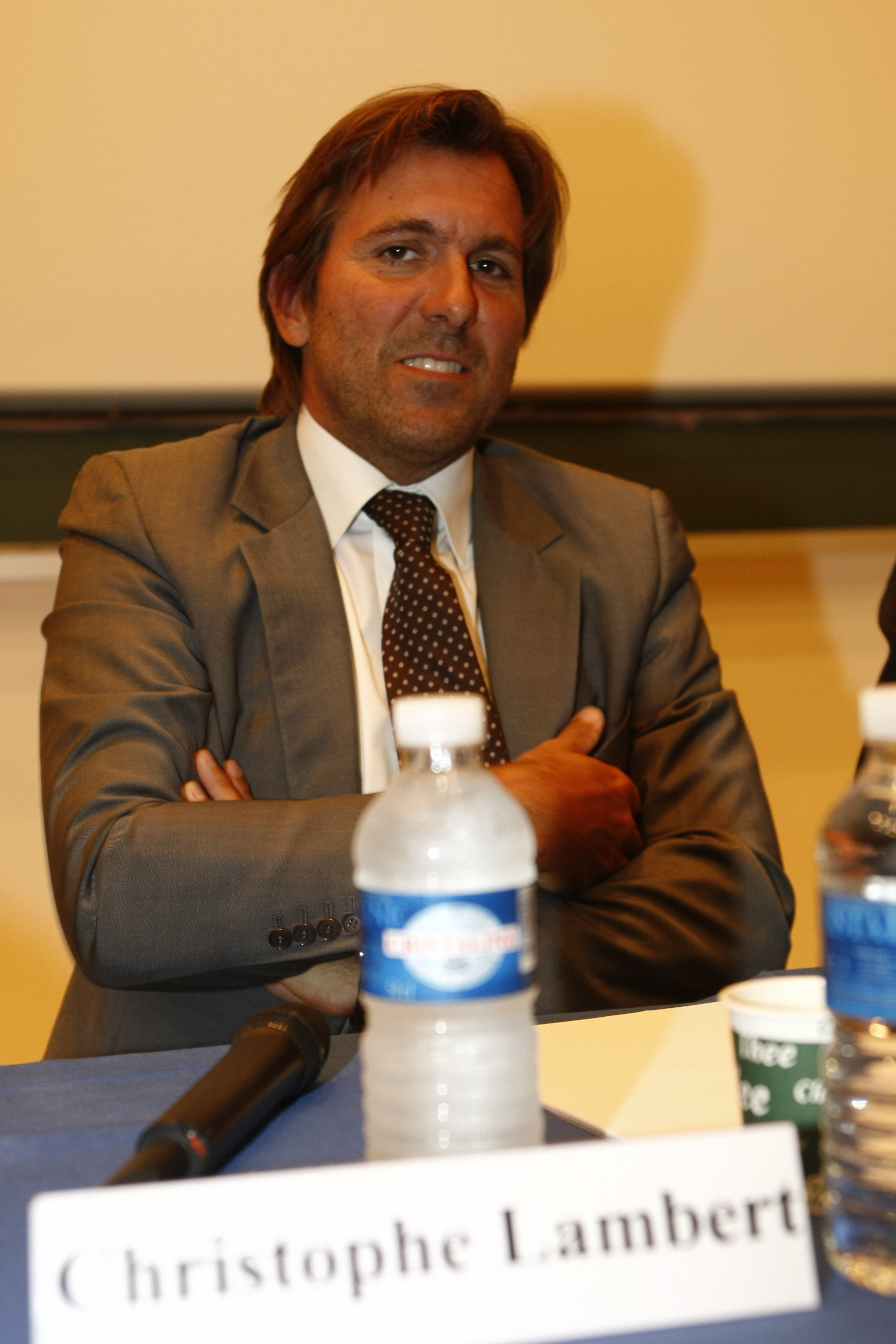 Christophe Lambert à l'université d'été du MEDEF 2008